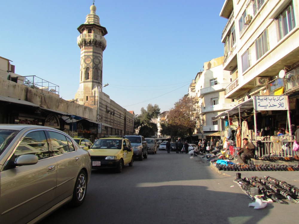 شارع باب الجابية